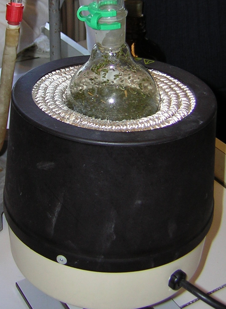 Photographie d'un chauffe ballon utilisé dans les établissements scolaires en France